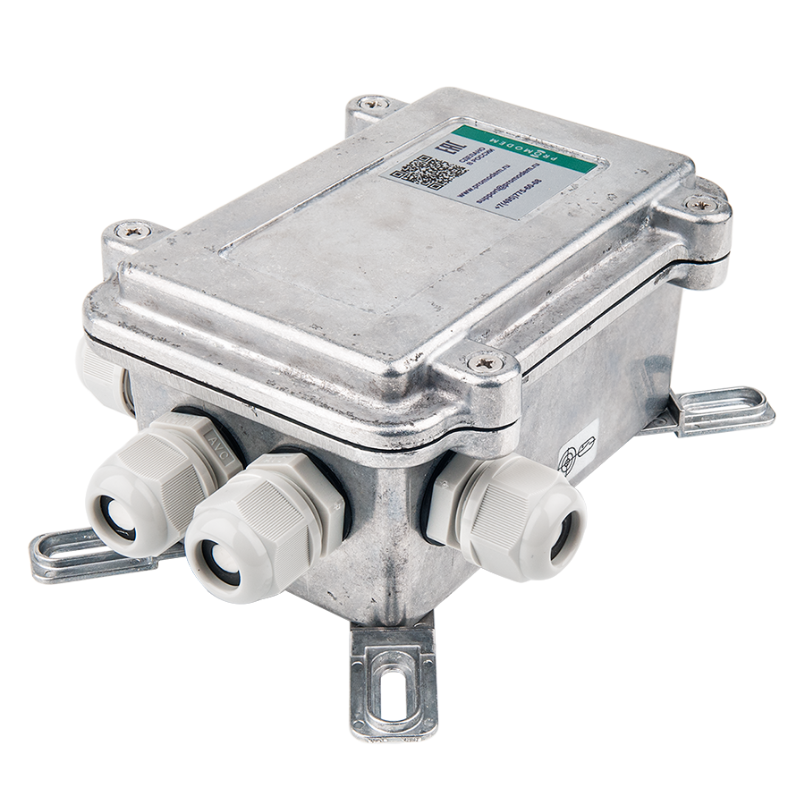 Промышленный GPRS/SMS/NB-IoT логгер PROMODEM с питанием от встроенной батареи